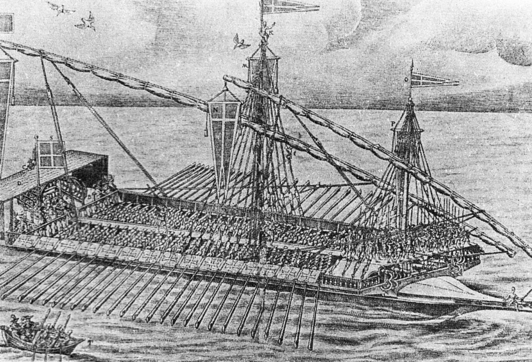 Malteser_Galeere